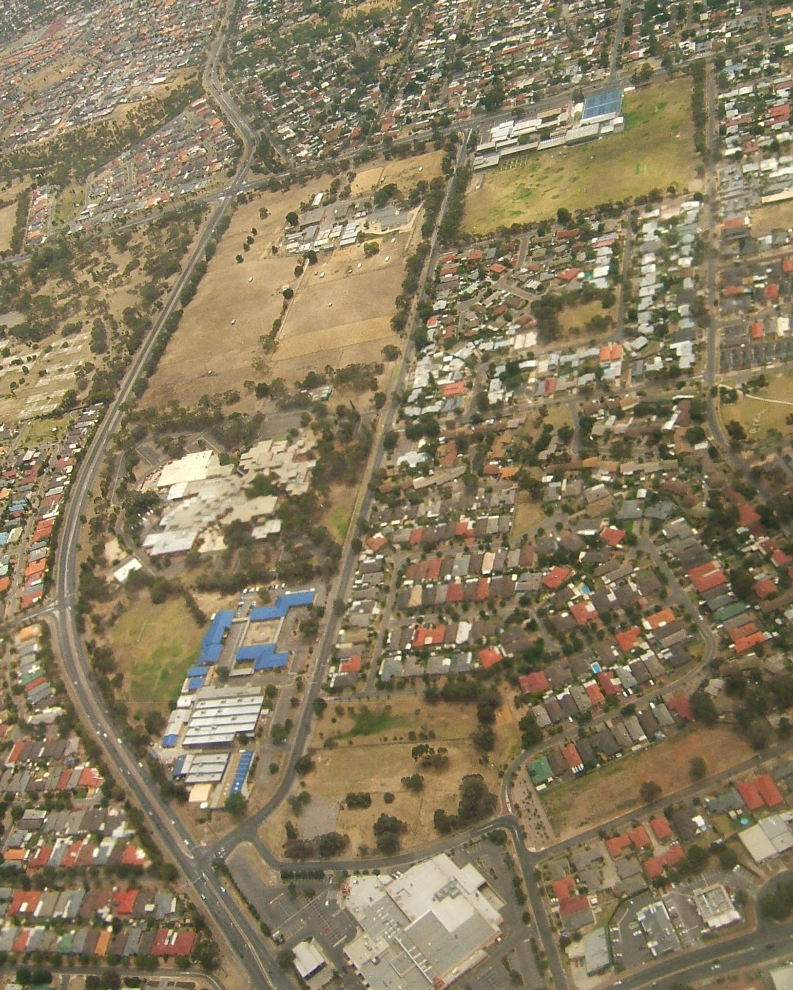 Gilles Plain aerial view, Adelaide